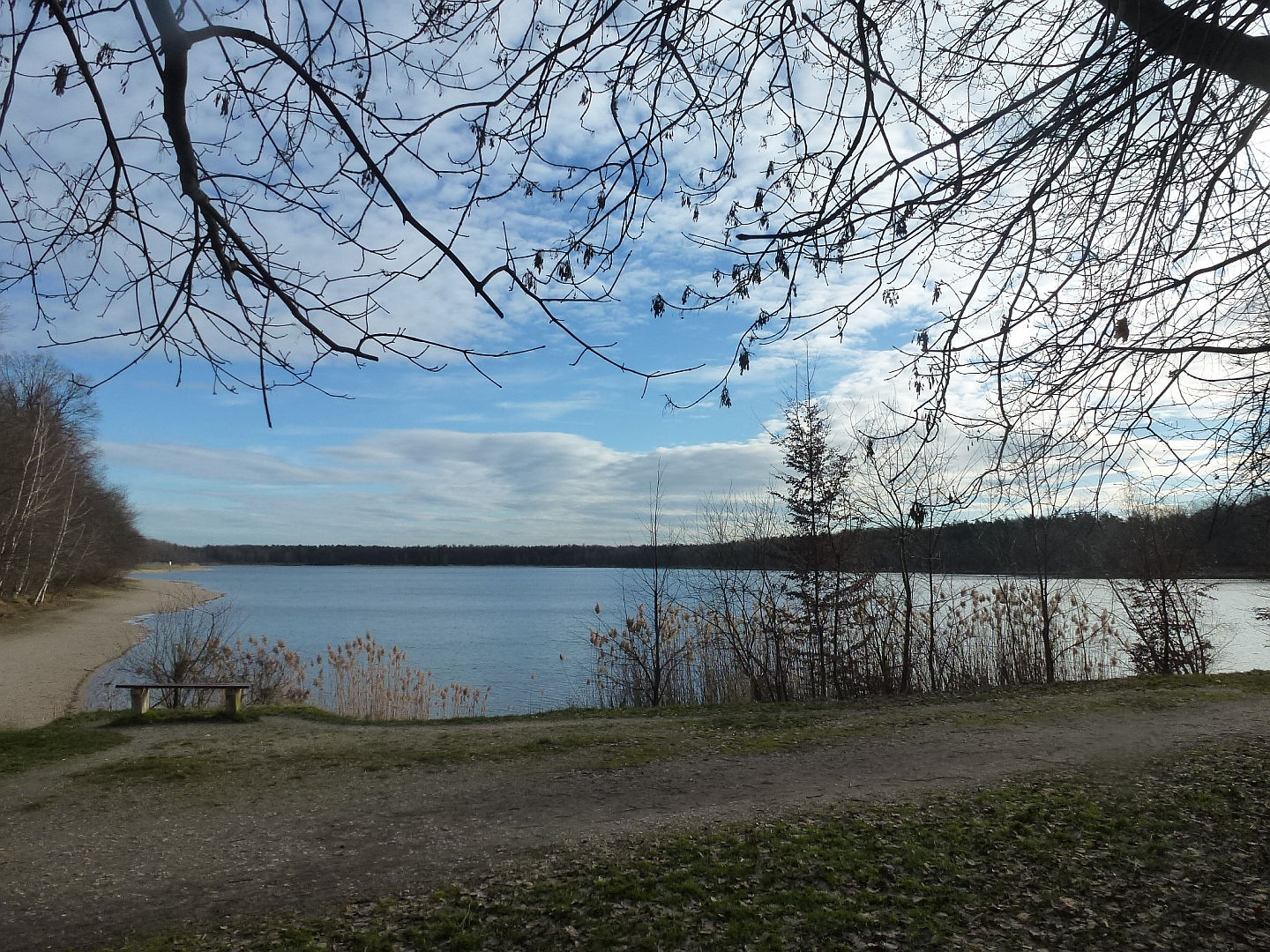 Ammelshainer See